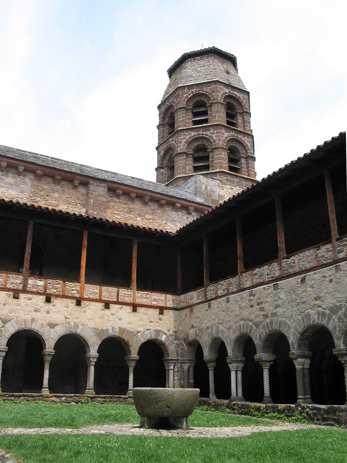 Lavaudieu (Haute-Loire - France), tour de croisée du transept de l'abbatiale et galerie occidentale du cloître de l'abbaye Saint-André (XI/XIIe siècles).